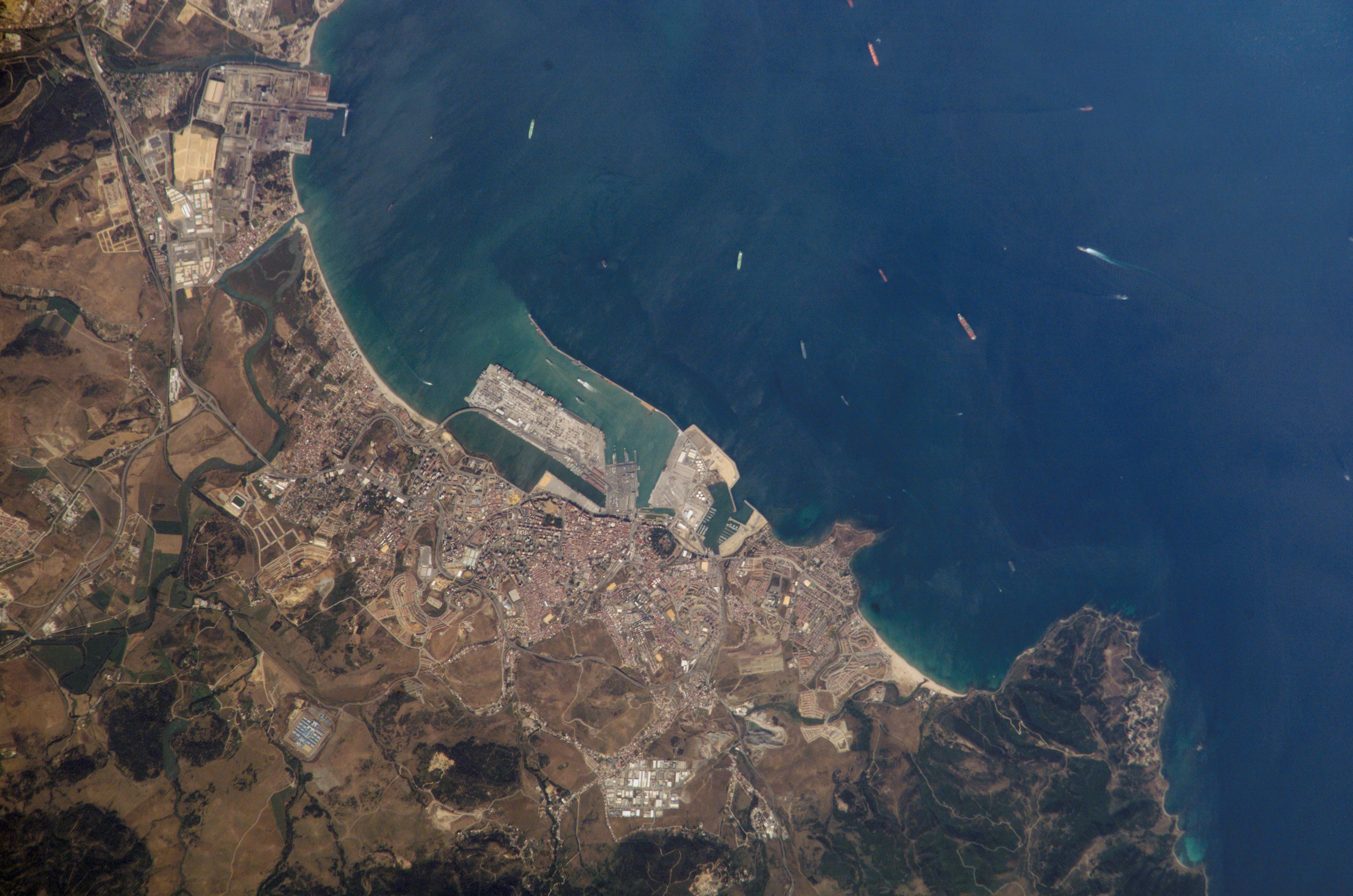 Imagen de satélite de la costa de Algeciras, Andalucía, España, desde 393 kilómetros de altura.